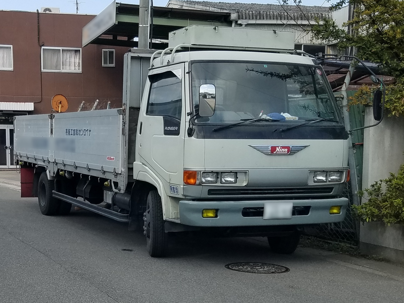 デーキャブレンジャー